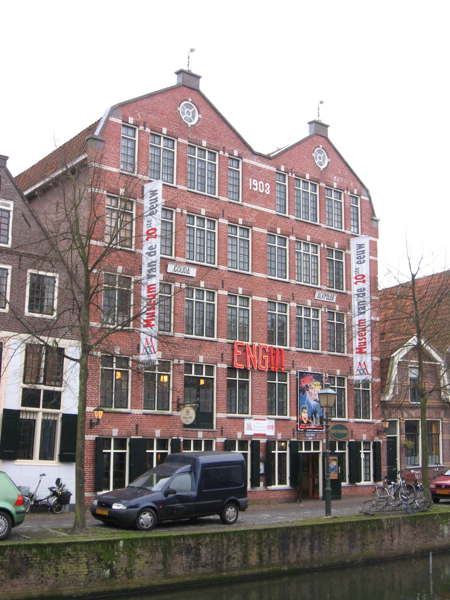 Museum van de Twintigste Eeuw; Bierkade, Hoorn, dec 2006